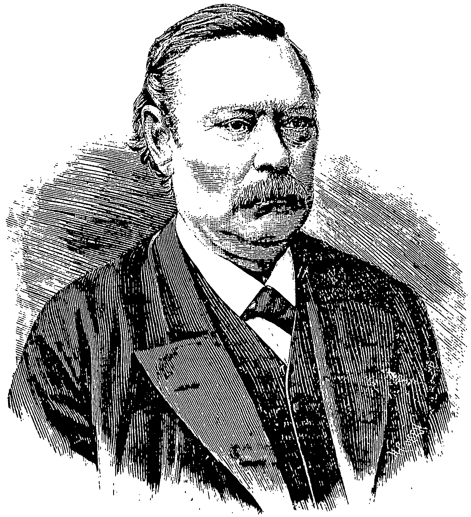 Embetsmannen Ludvig Daae (1829–1893).